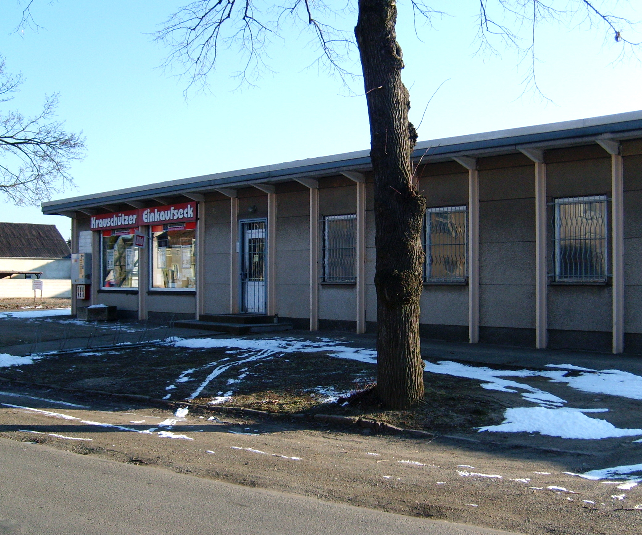 Ehemalige Kaufhalle Krauschütz